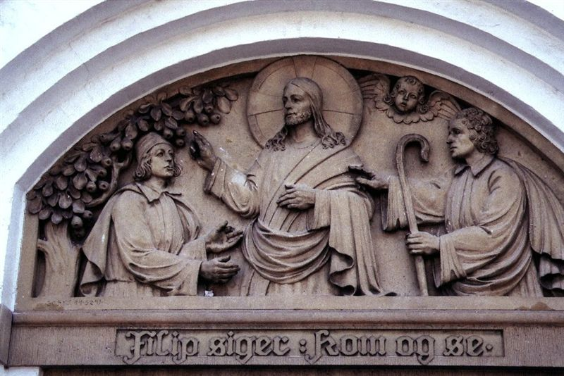 Filips Kirke i Danmark. Tympanonrelief over vestportalen